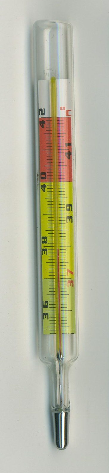 termometr lekarski 37,9°C